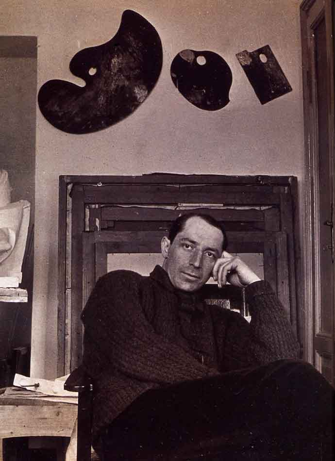 Umberto Boccioni, 1914